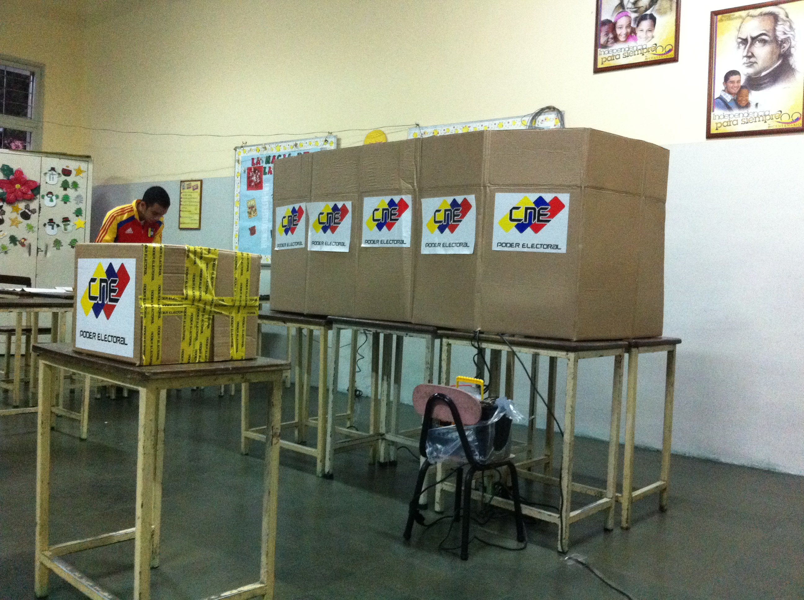 Elecciones municipales 2013, Mun. Guaicaipuro, Estado Miranda